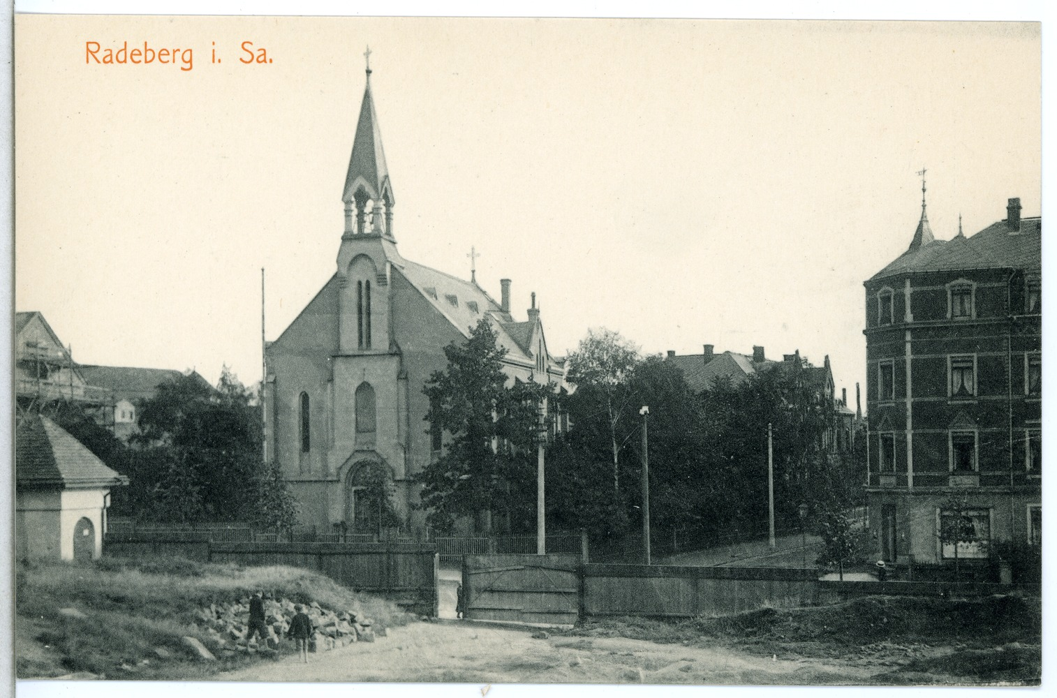 Radeberg; Katholische Kirche This postcard is from publisher Brück & Sohn in Meißen ( postcard has a unique number 15228 and is available in a higher resolution at the publisher. This images was uploaded in a cooperation project between Wikipedians and the publisher.